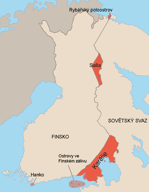 Mapa finsko-ruské hranice po Moskevském míru.